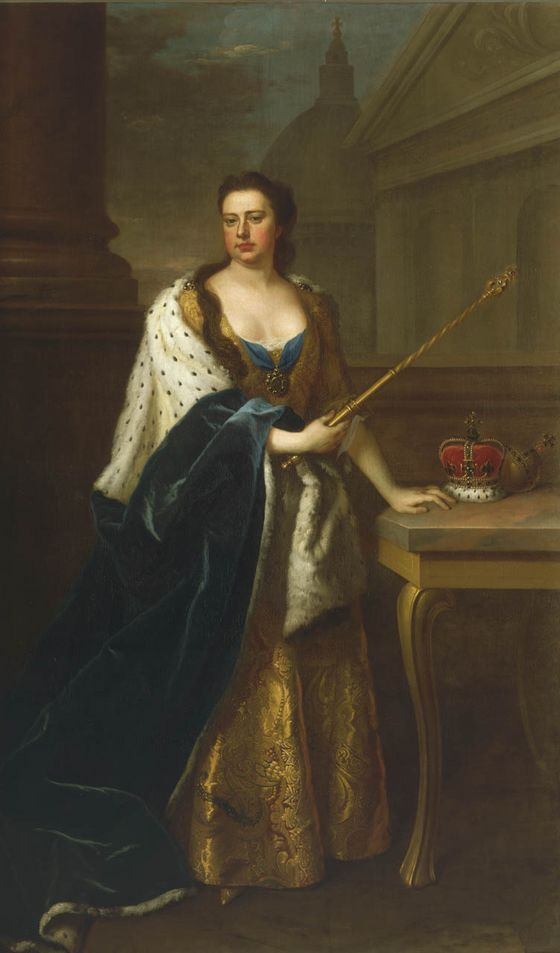 Парадный портрет королевы Анны